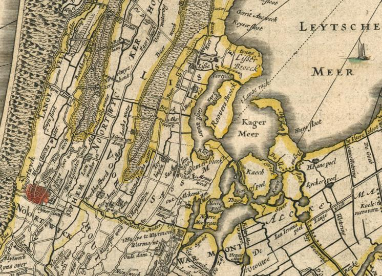 kagermeer, Rijnland amstelland atlasmaior